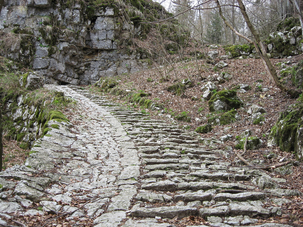 La Calà del Sasso in provincia di Vicenza - Italia.